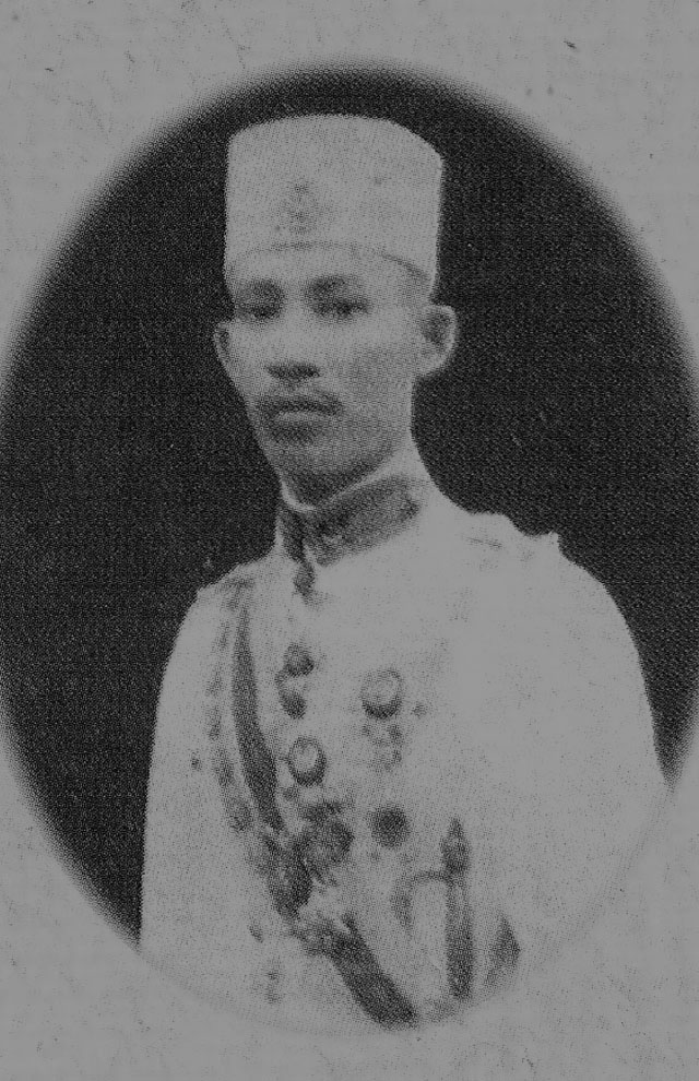 Pengasas Majlis Agama Islam dan Adat Istiadat Melayu Kelantan